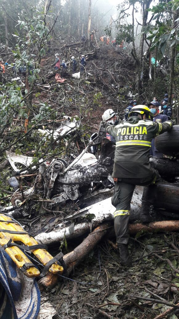 Labores de rescate de la Policía Nacional de Colombia al vuelo 2933 de LaMia, en área rural de La Unión (Antioquia).